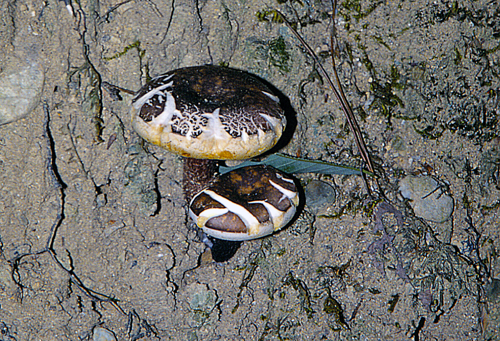 Spécimens de petite taille, craquelés par la sécheresse.